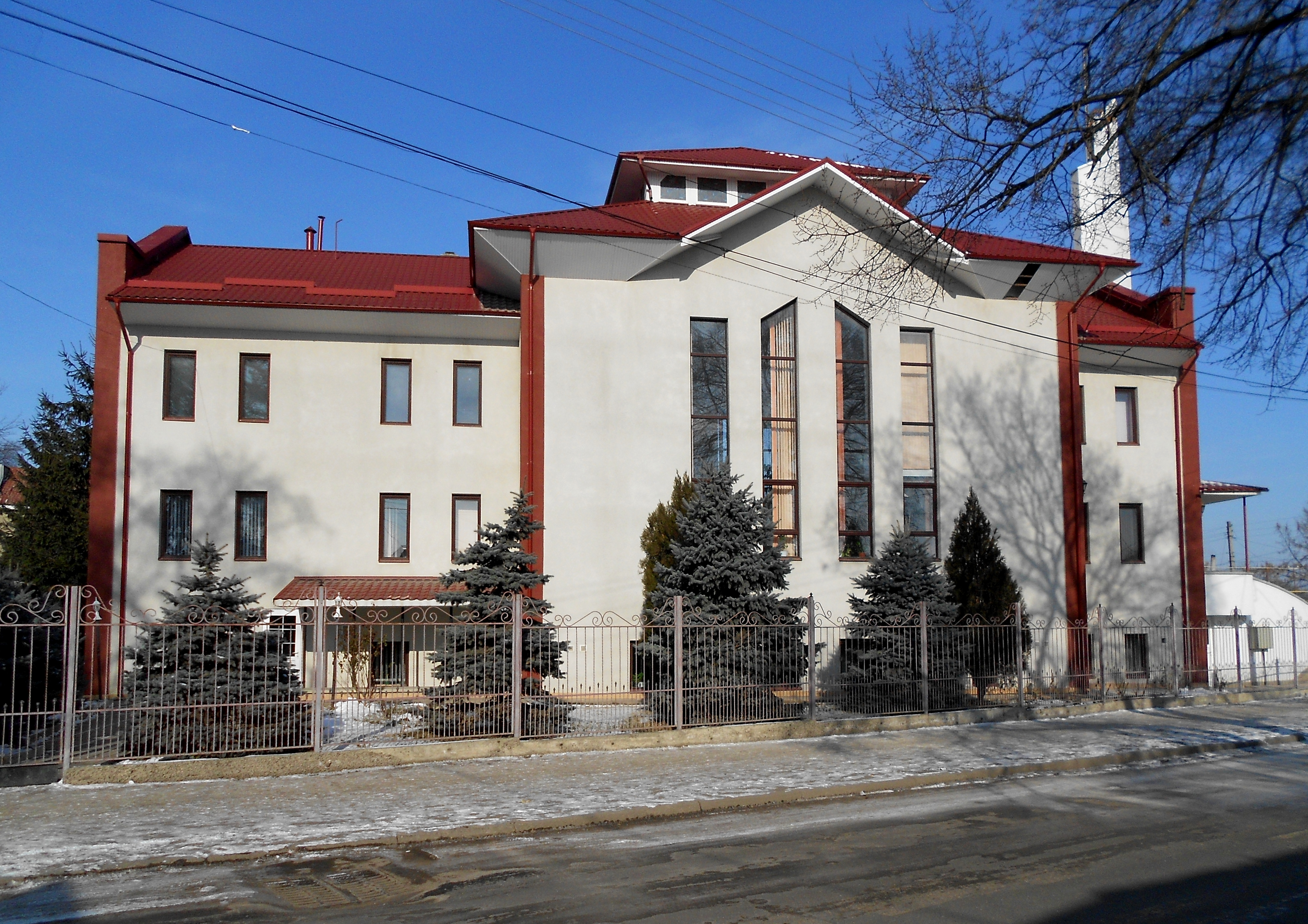 Biserica baptistă Emanuel din Bălți